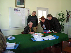 Hoorzitting enquête-commissie vuilkuil Rémilly